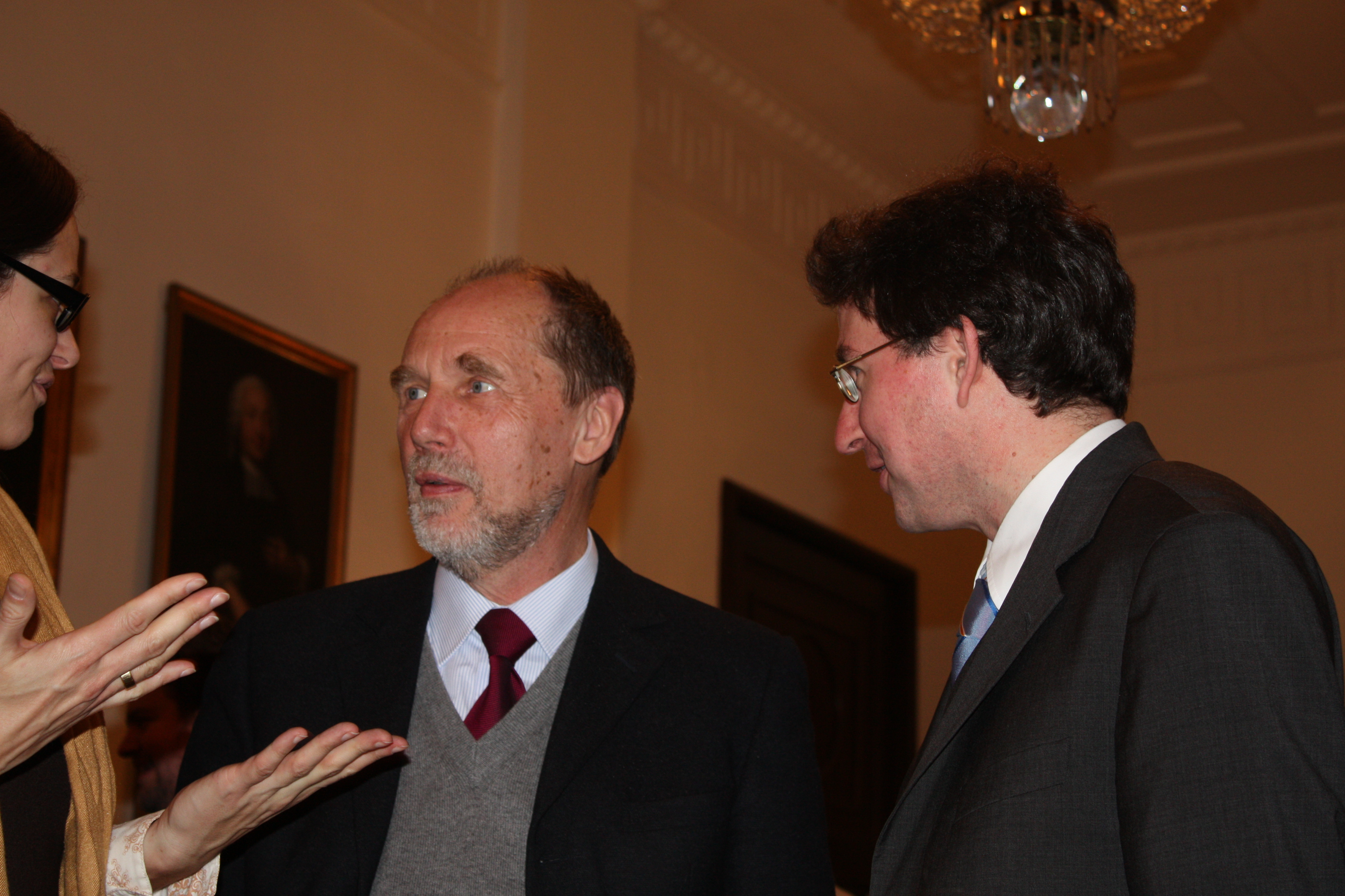 Prof. Dr. Sönke Lorenz auf dem Empfang nach der Antrittsvorlesung von Prof. Dr. Steffen Patzold (rechts im Bild)